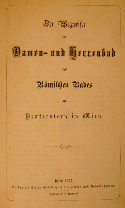 Roemerbad-Wien 1873